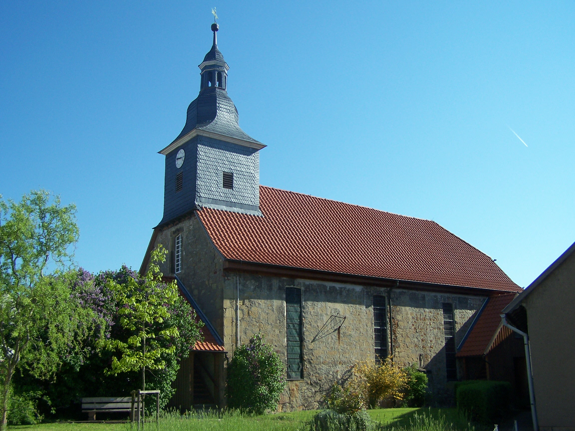 Kirche